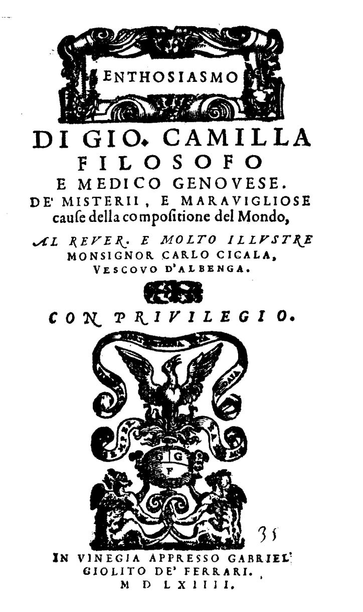 Enthosiasmo di Gio. Camilla filosofo e medico genouese. De' misterii, e marauigliose cause della compositione del mondo, .... - In Vinegia : appresso Gabriel Giolito de' Ferrari, 1564 ([Venezia : Gabriel Giolito de Ferrari]). - [16], 110, [2] p. ; 8º .